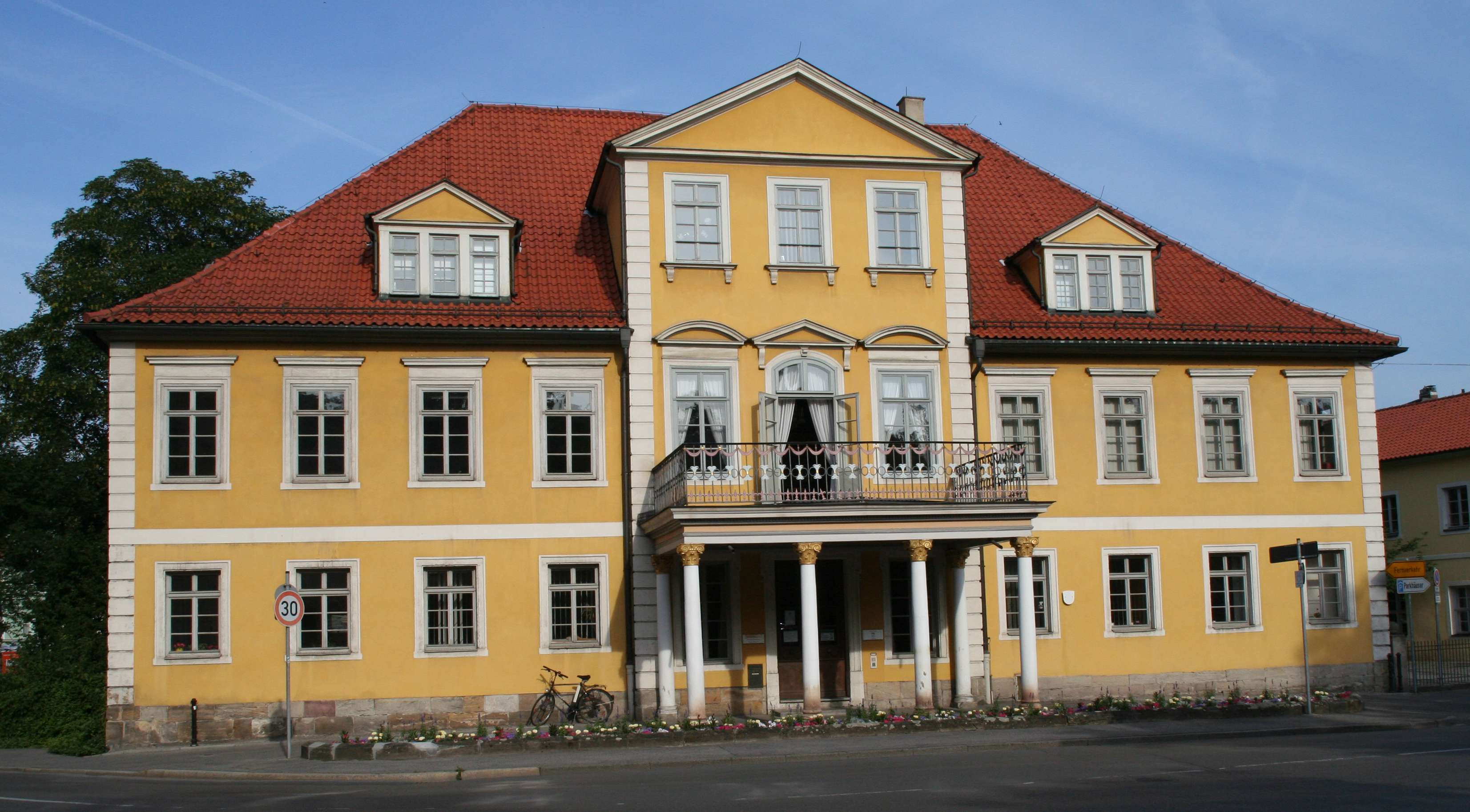 Bürglaß-Schlösschen Coburg in der Innenstadt am Landestheater